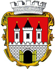 znak obce Železnice (Jičín)